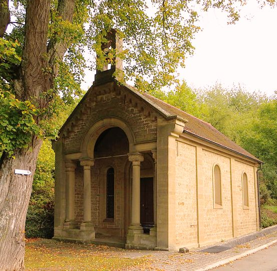 Rohrbach am Giesshuebel Marienkapelle, Eppingen.